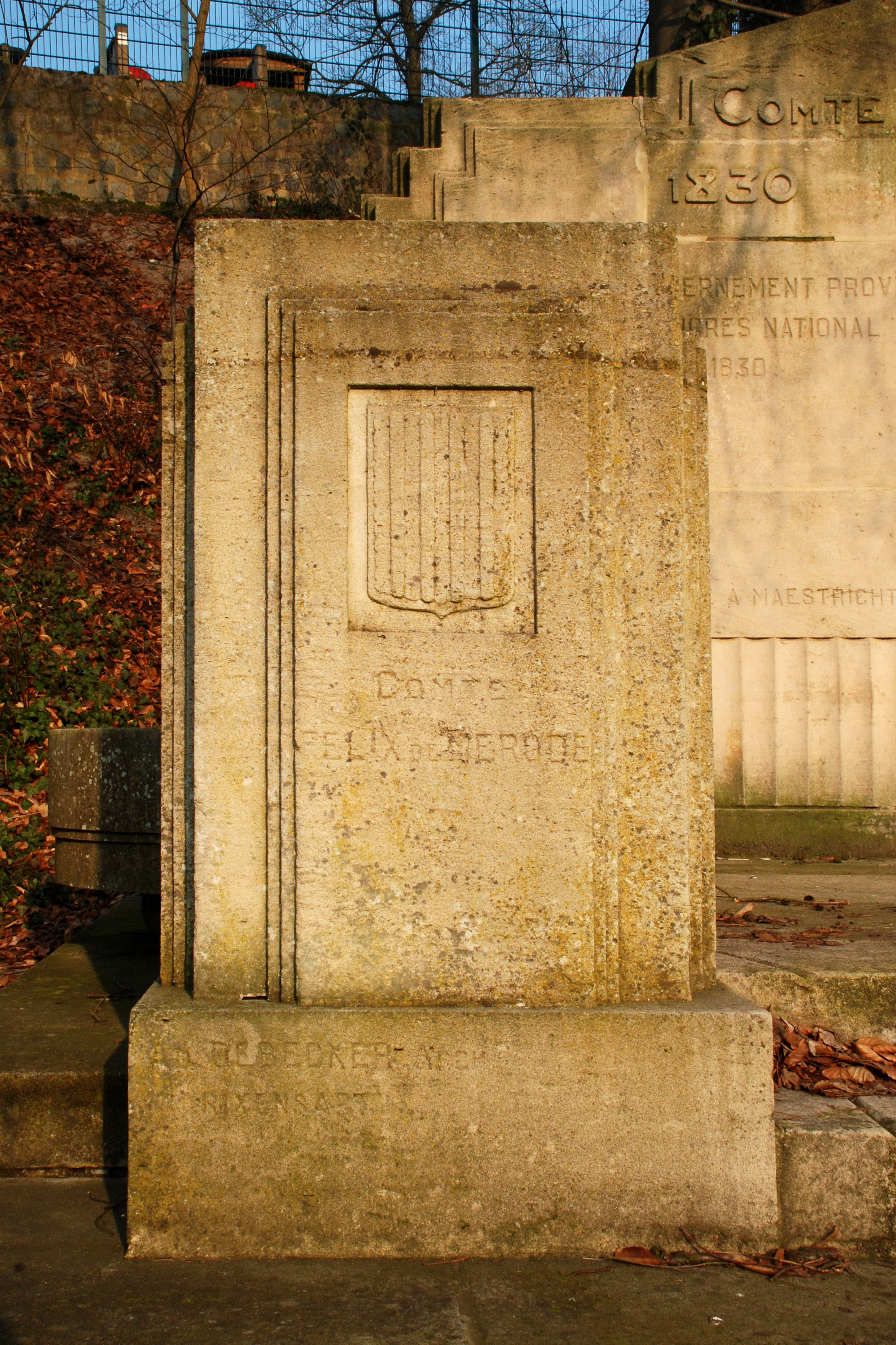 Belgique - Brabant wallon - Rixensart - Monument au comte Félix de Mérode